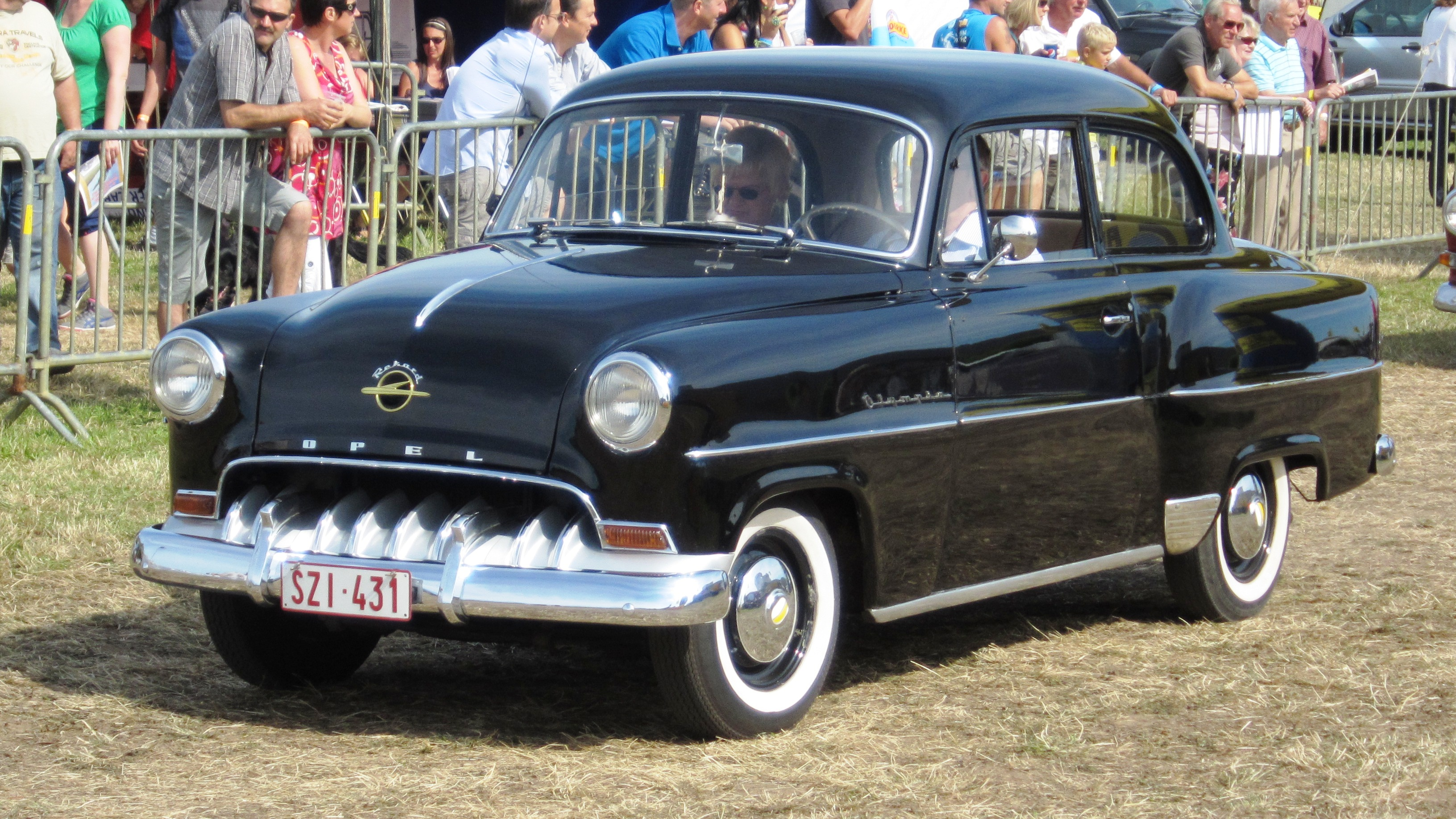 Opel Olympia Rekord "Guele de Requin"